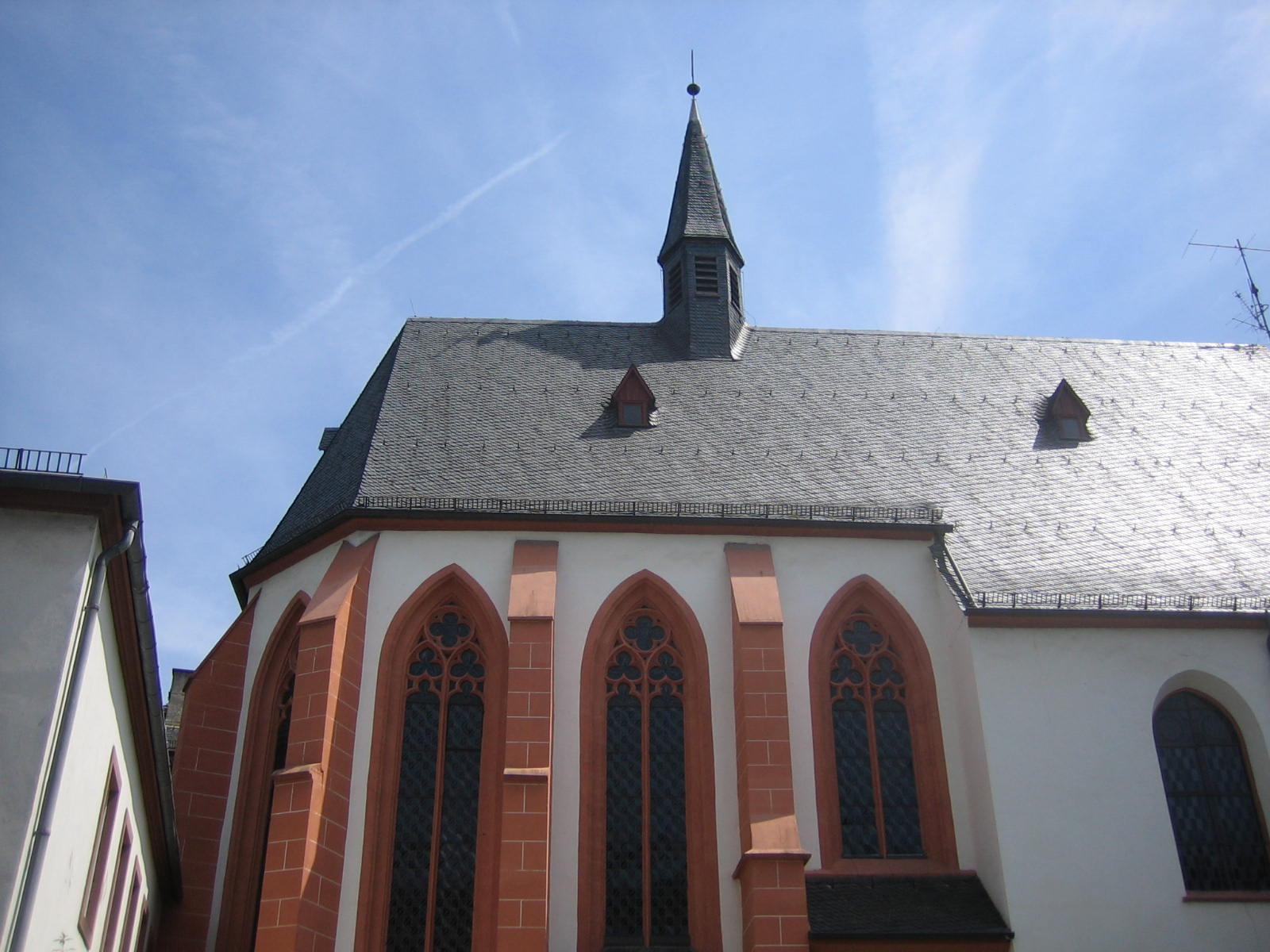 Klosterkirche der Antoniter in Mainz, ab 1619 Armklara abgeleitet von den Nonnen des 3. Orden des Heiligen Franziskus